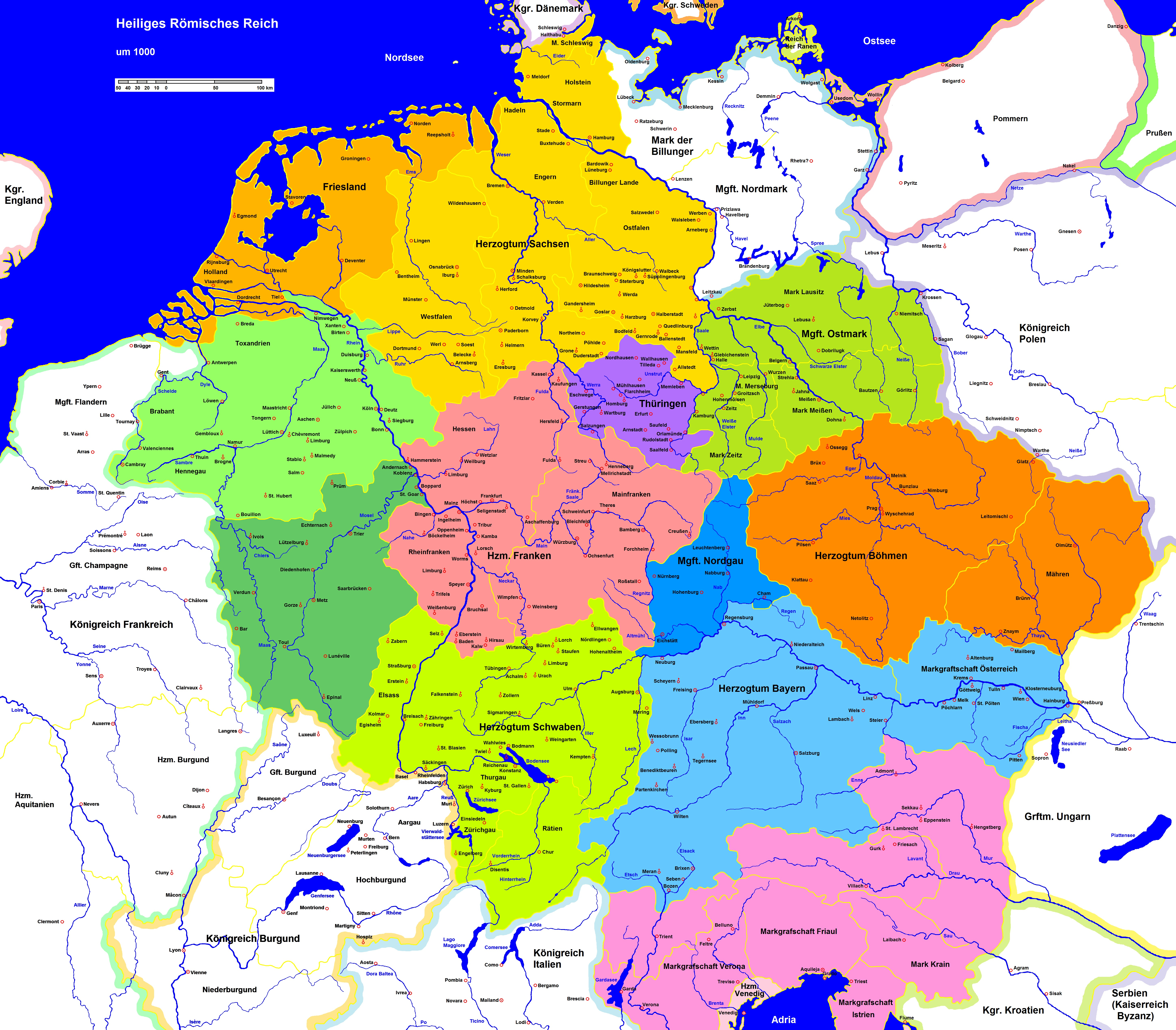 Heiliges Römisches Reich um 1000